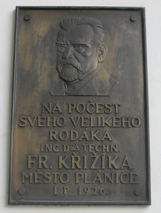 Fotografie Plánického rodného domu Františka Křižíka. Stavba dnes slouží jako museum.